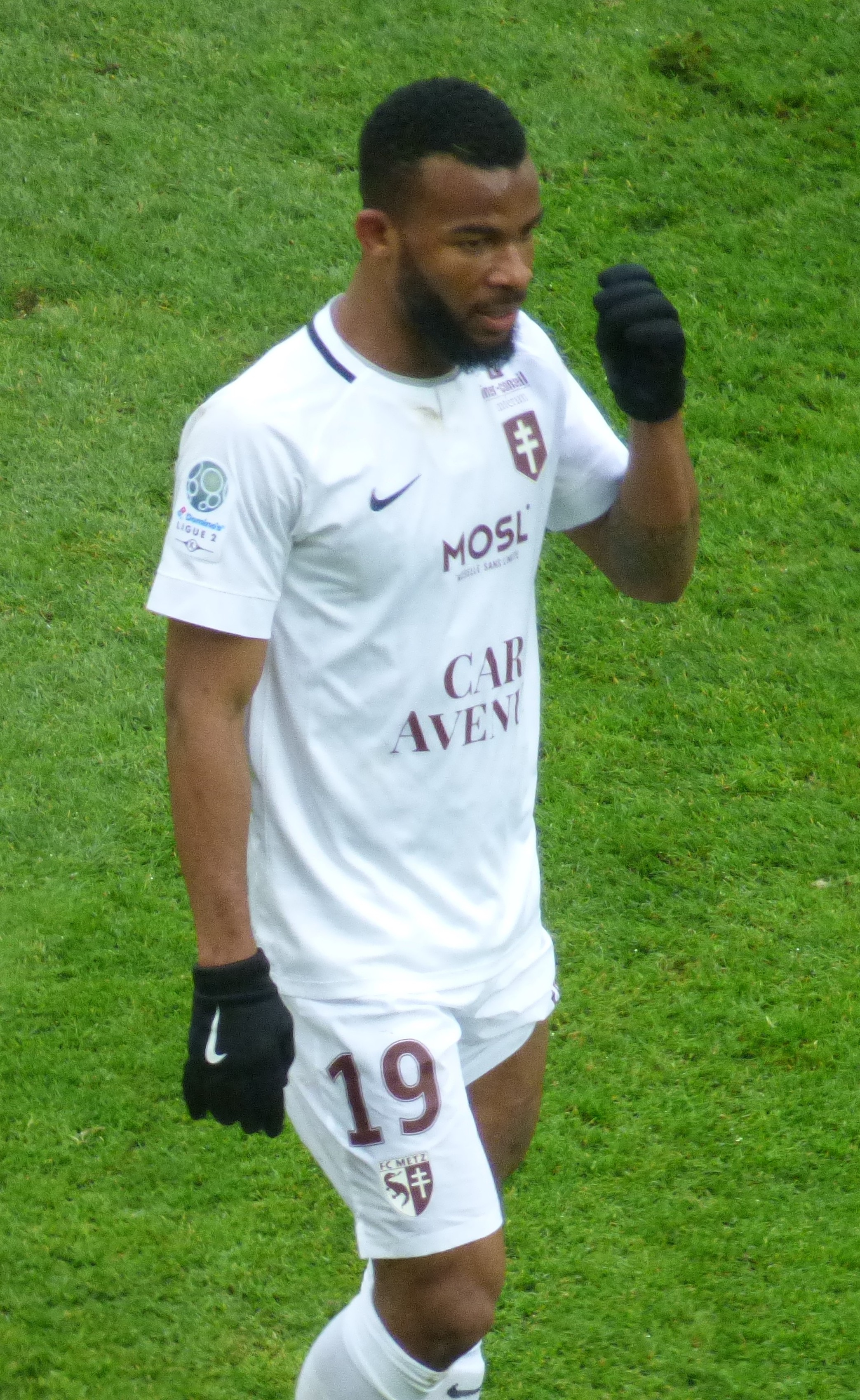 Habib Maïga pendant le match RC Lens / FC Metz, comptant pour la vingt-quatrième journée du championnat de France de Ligue 2 2018-2019, le 9 février 2019, au Stade Bollaert-Delelis.